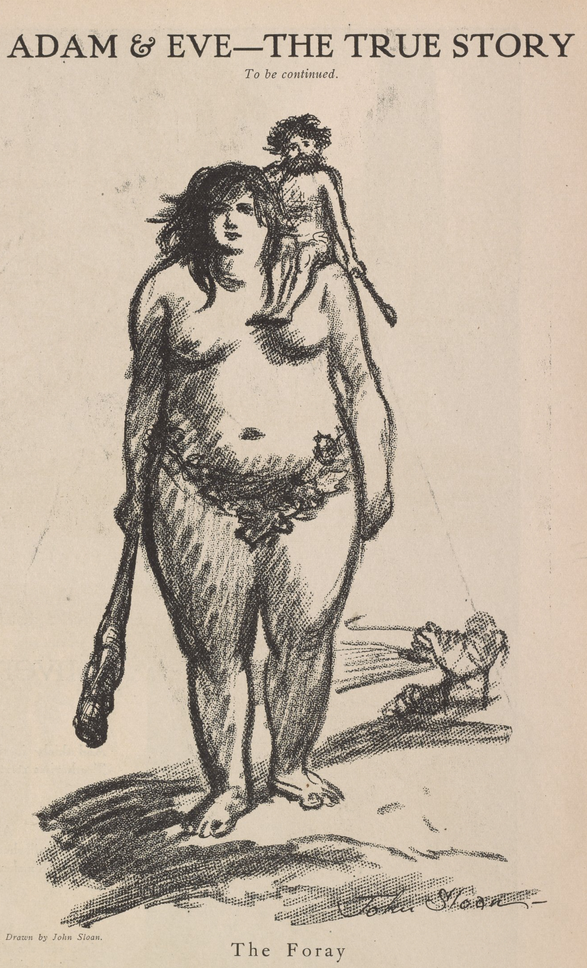 en el número de febrero de 1913 de The Masses.